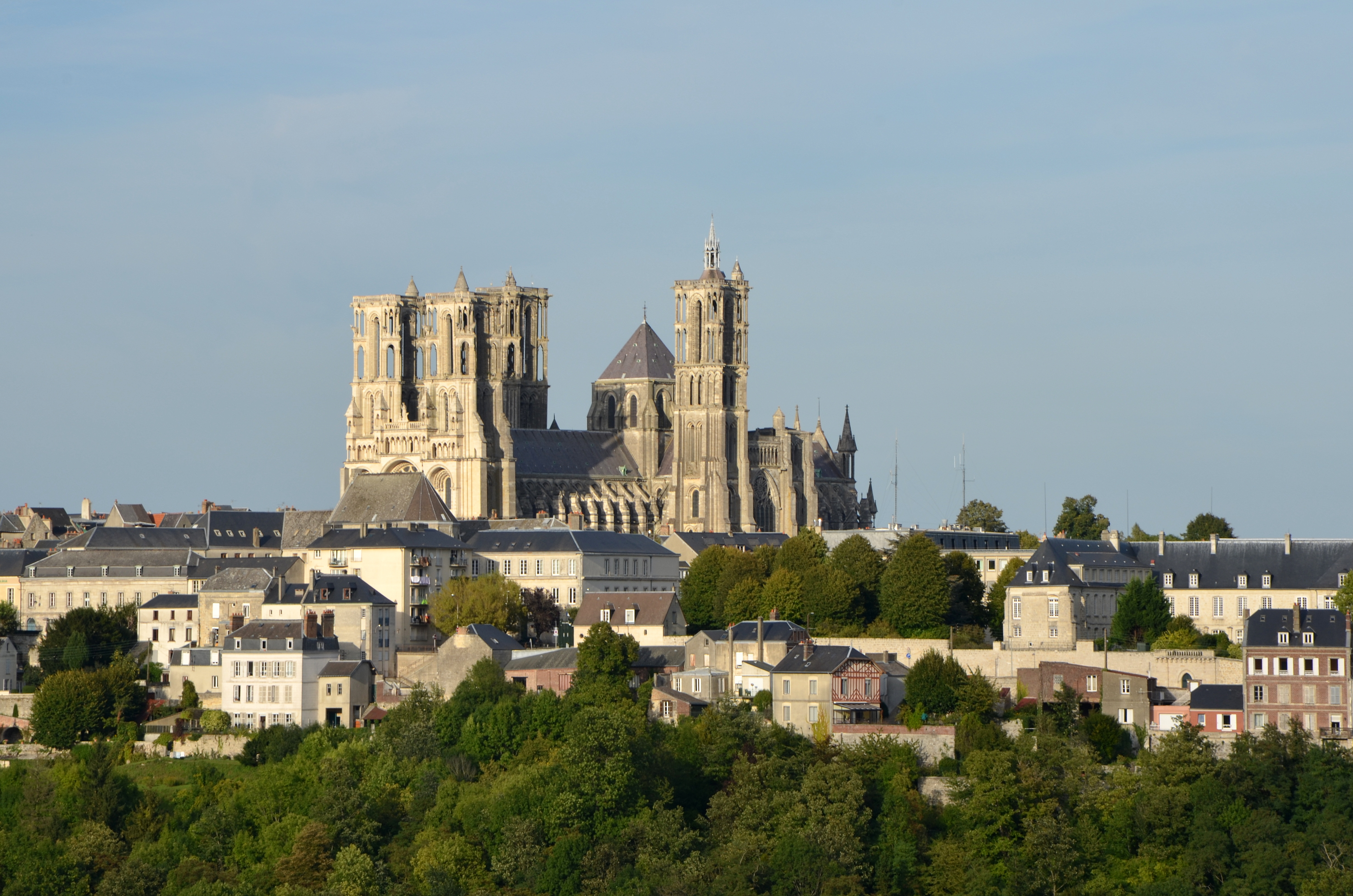 La cathédrale de Laon, (Aisne, France) vue depuis la branche sud ouest de la ville haute.